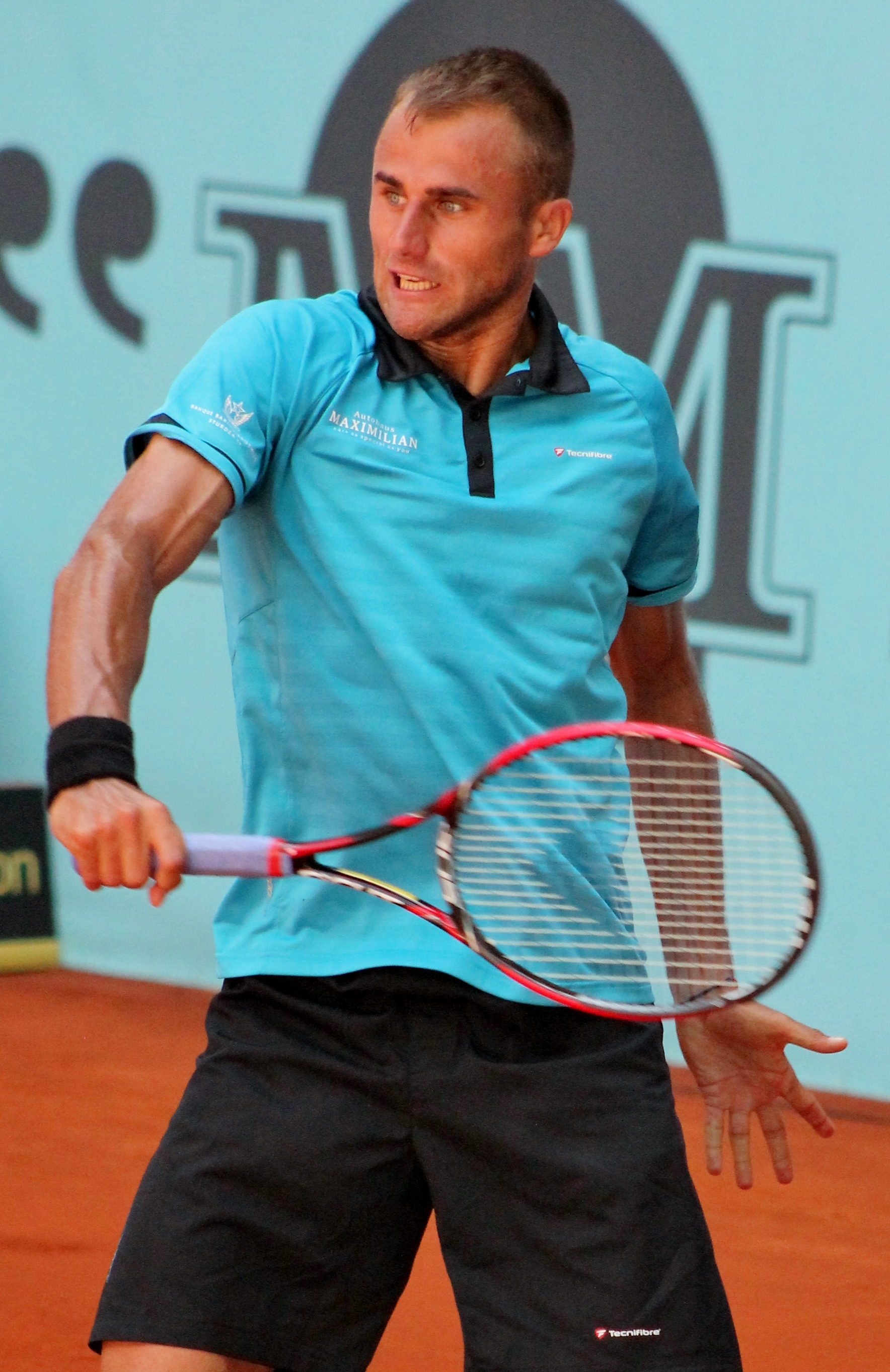 Copil MA14 (10)